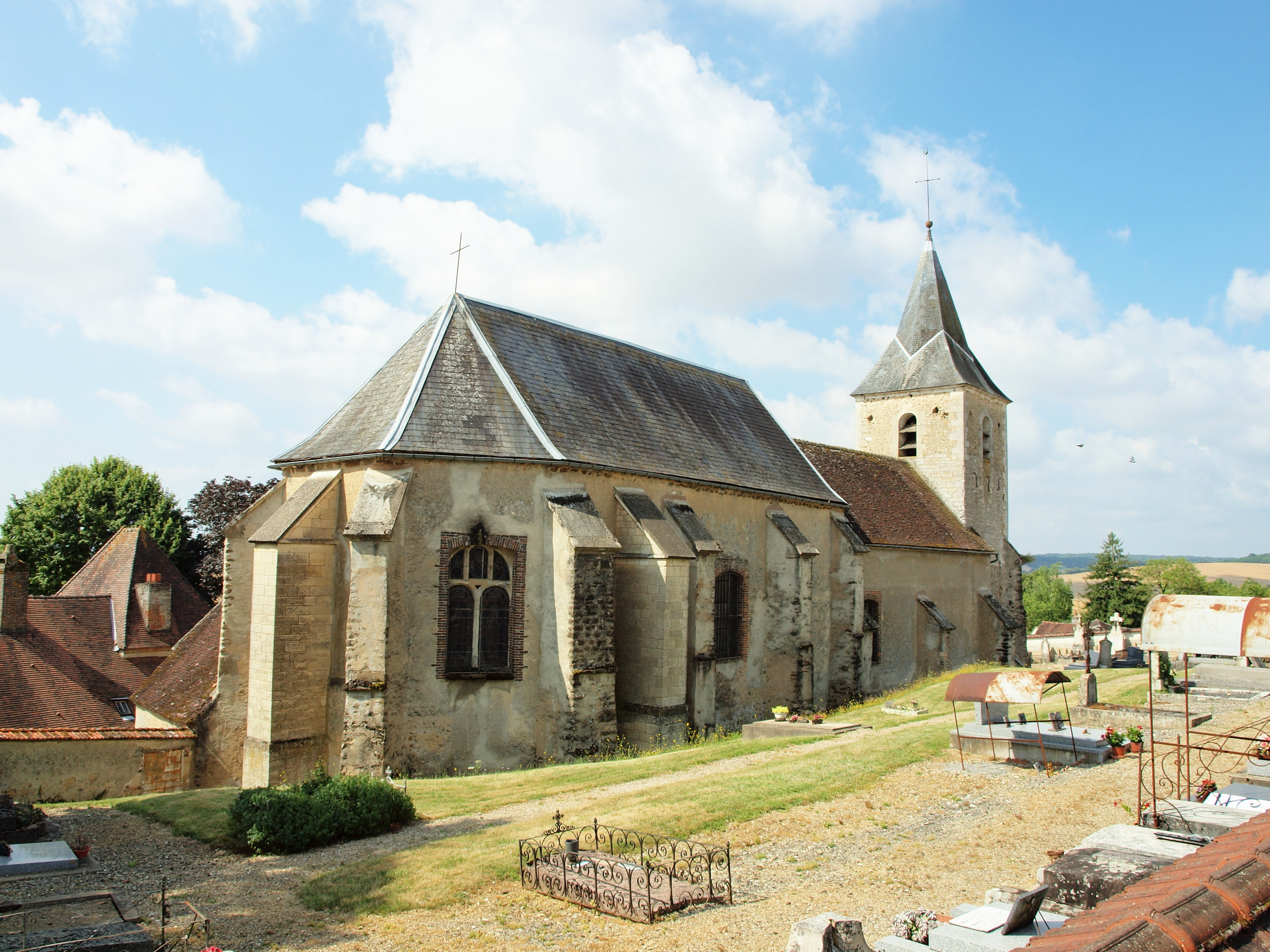 Bellechaume (Yonne, France)